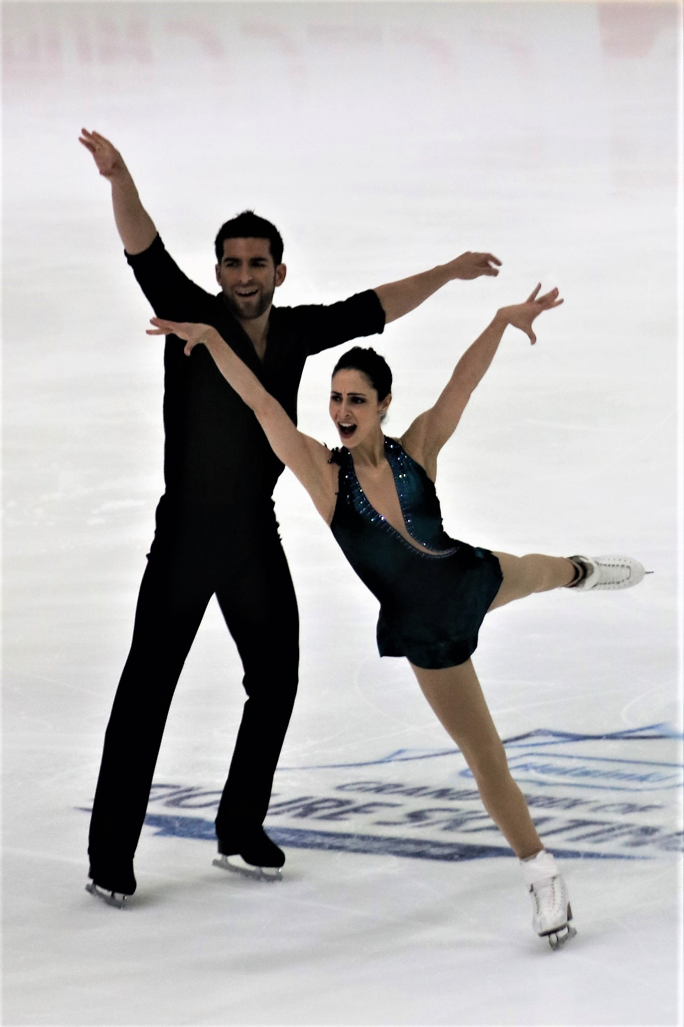 Деанна Стеллато-Дудек / Натан Бартоломей (США) на Гран-при Хельсинки 2018.